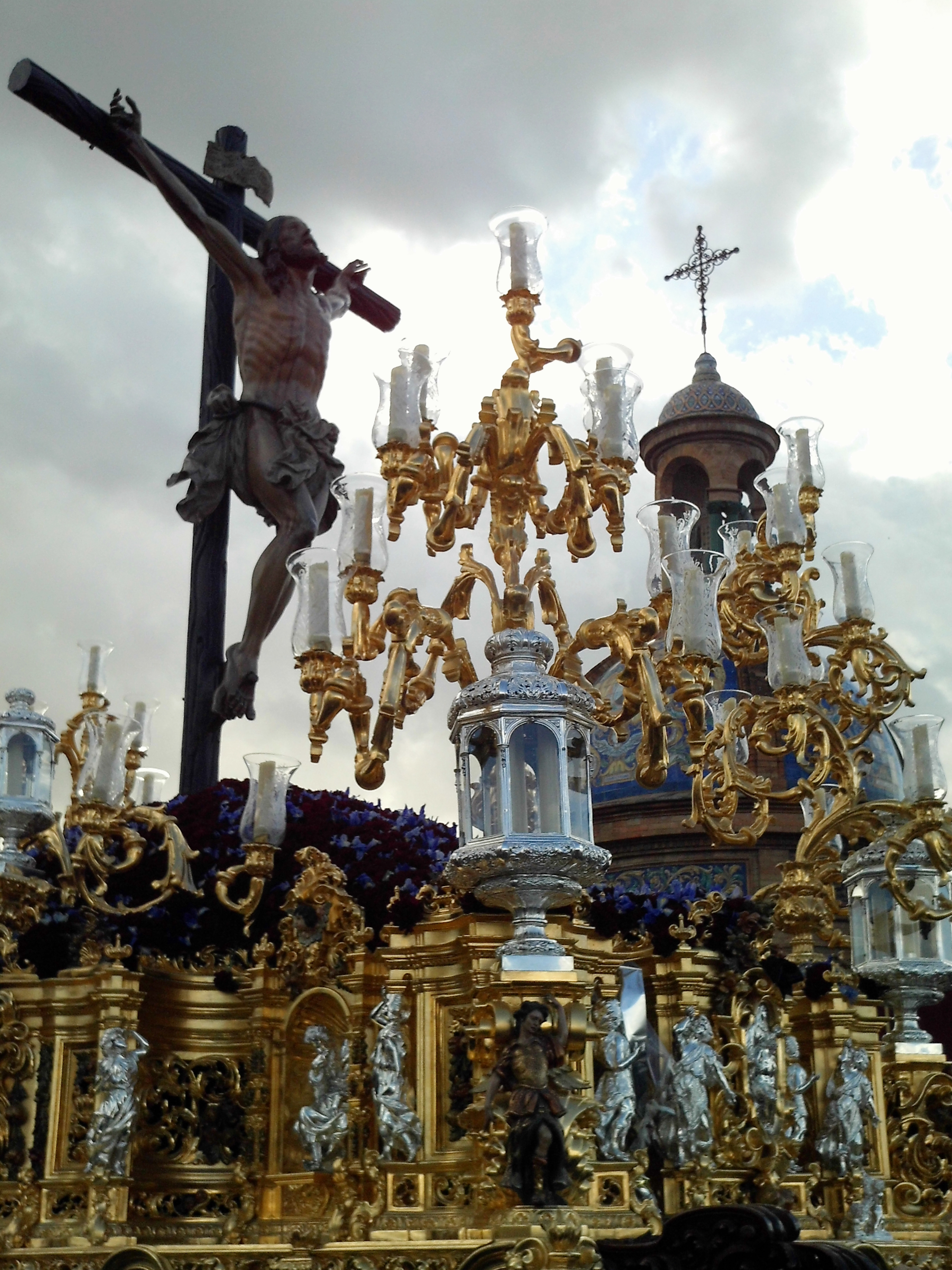 El Cachorro. Hermandad de Cachorro. Sevilla, Andalucía, España.